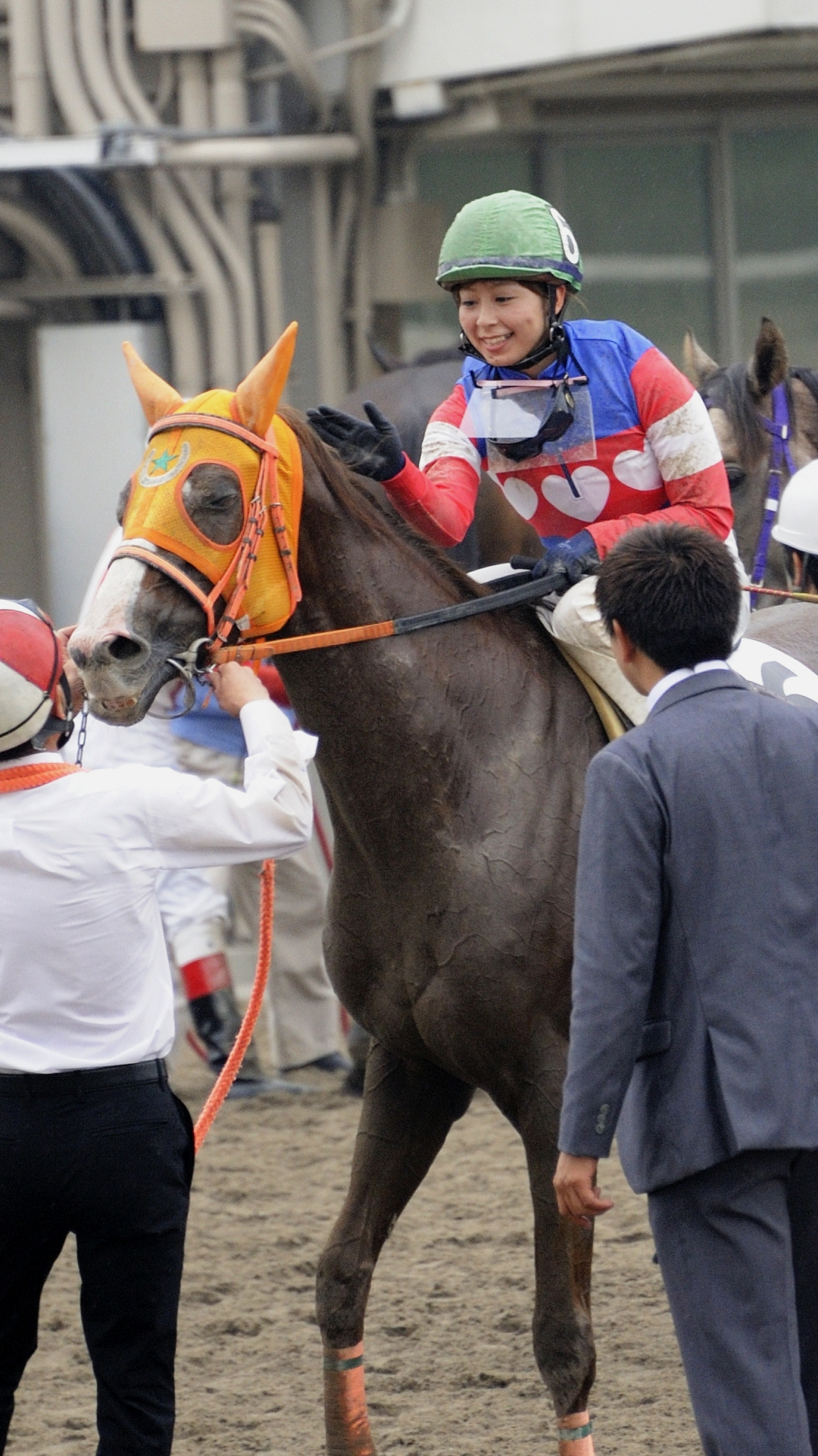 2016年7月13日、遠征先の大井競馬場で騎乗後に笑顔を見せる木之前葵騎手